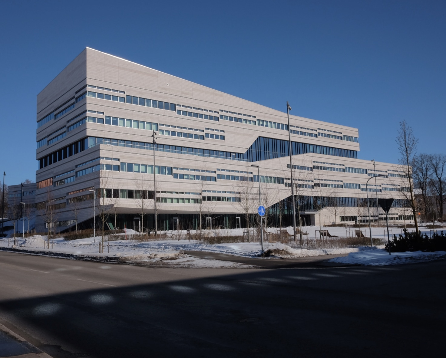 Segerstedthuset, Uppsala universitet.